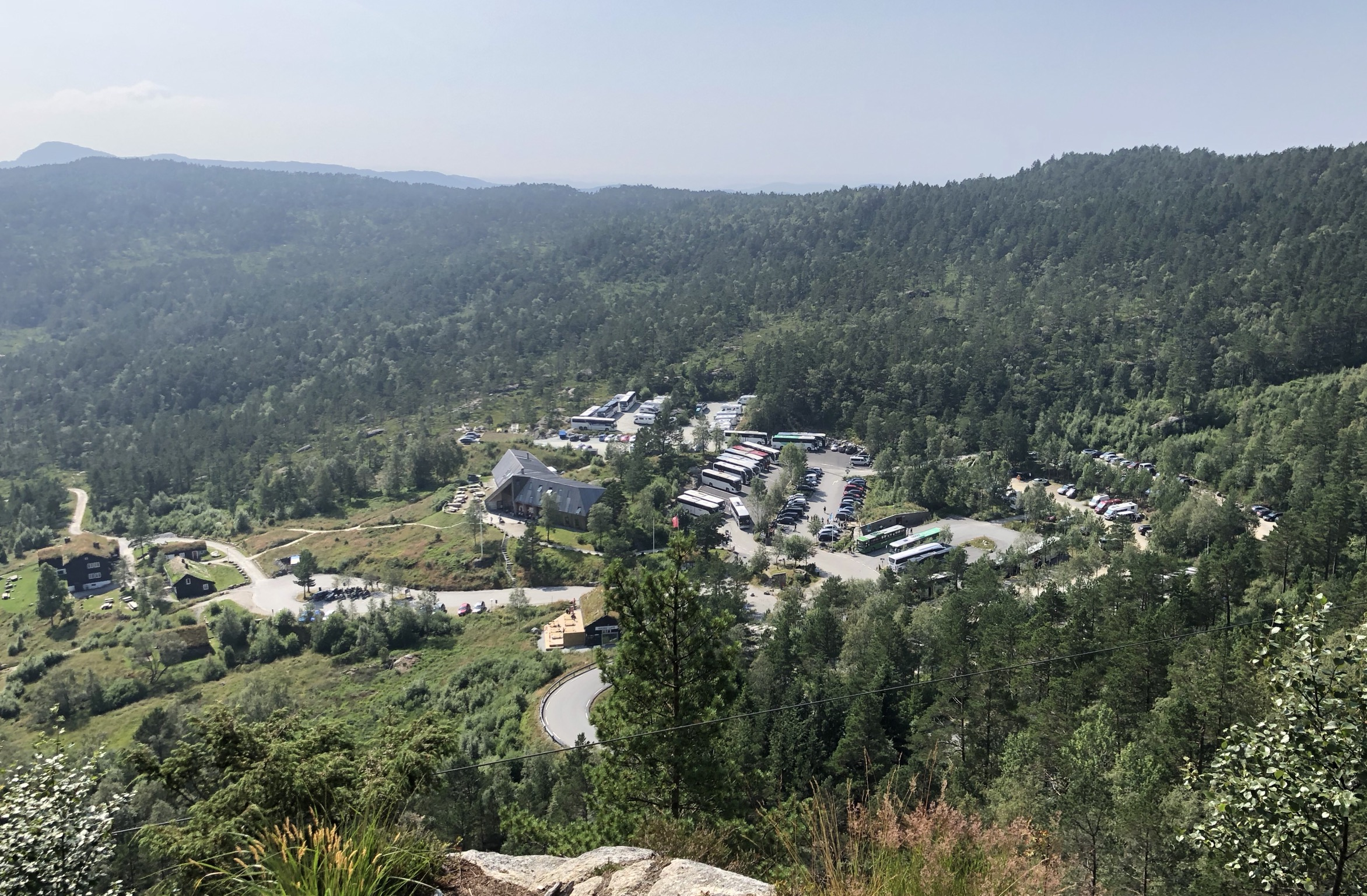 Berghütte Preikestolen 2019